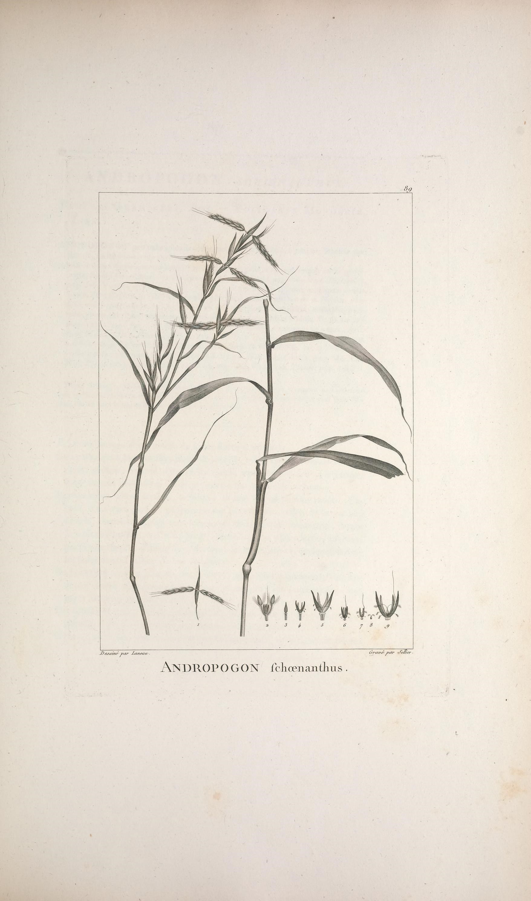 ANDROPO GON fcliœnantlius .